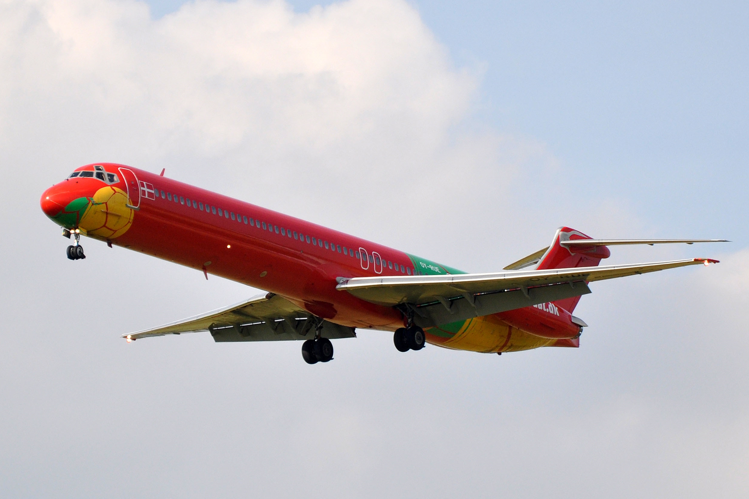 MSN 49936 LN 1778 MD-83 DAT DANISH AIR TRANSPORT CDG AIRPORT EX AIRTOURS AS G-HCRP / SUNWAYS AS TC-INB / AOM AS EI-CPA / SPANAIR AS EC-GVI / JETRANAIR AS N936MD AND YR-HBZ